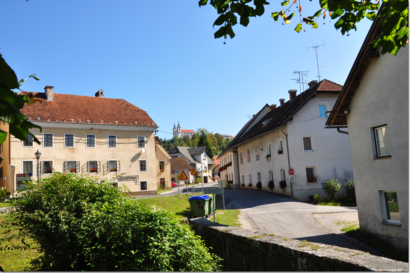 Zuzemberk (12)